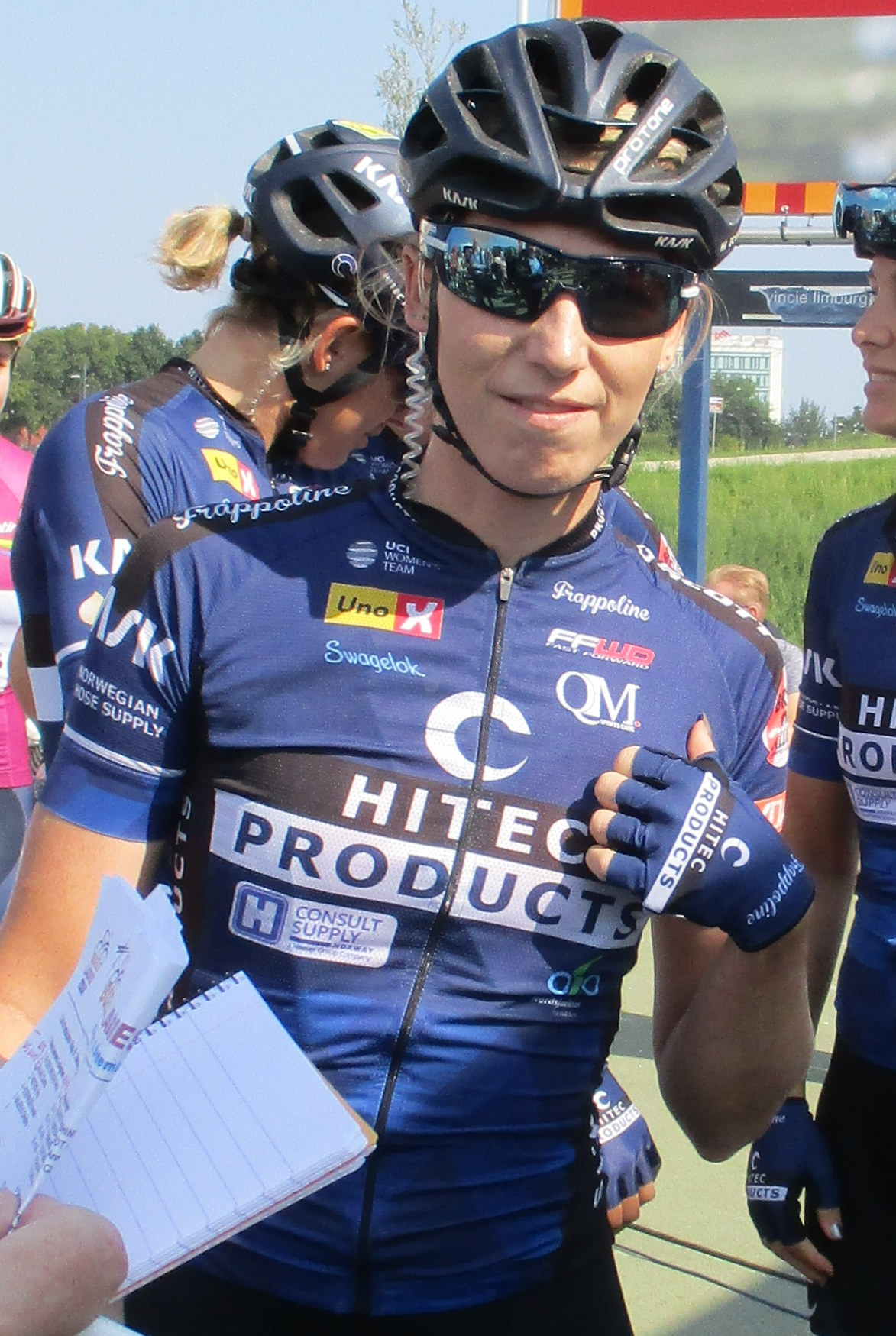 Start van de 6e etappe van de Boels Ladies Tour 2017 op het Tom Dumoulin Bike Park in Sittard-Geleen.